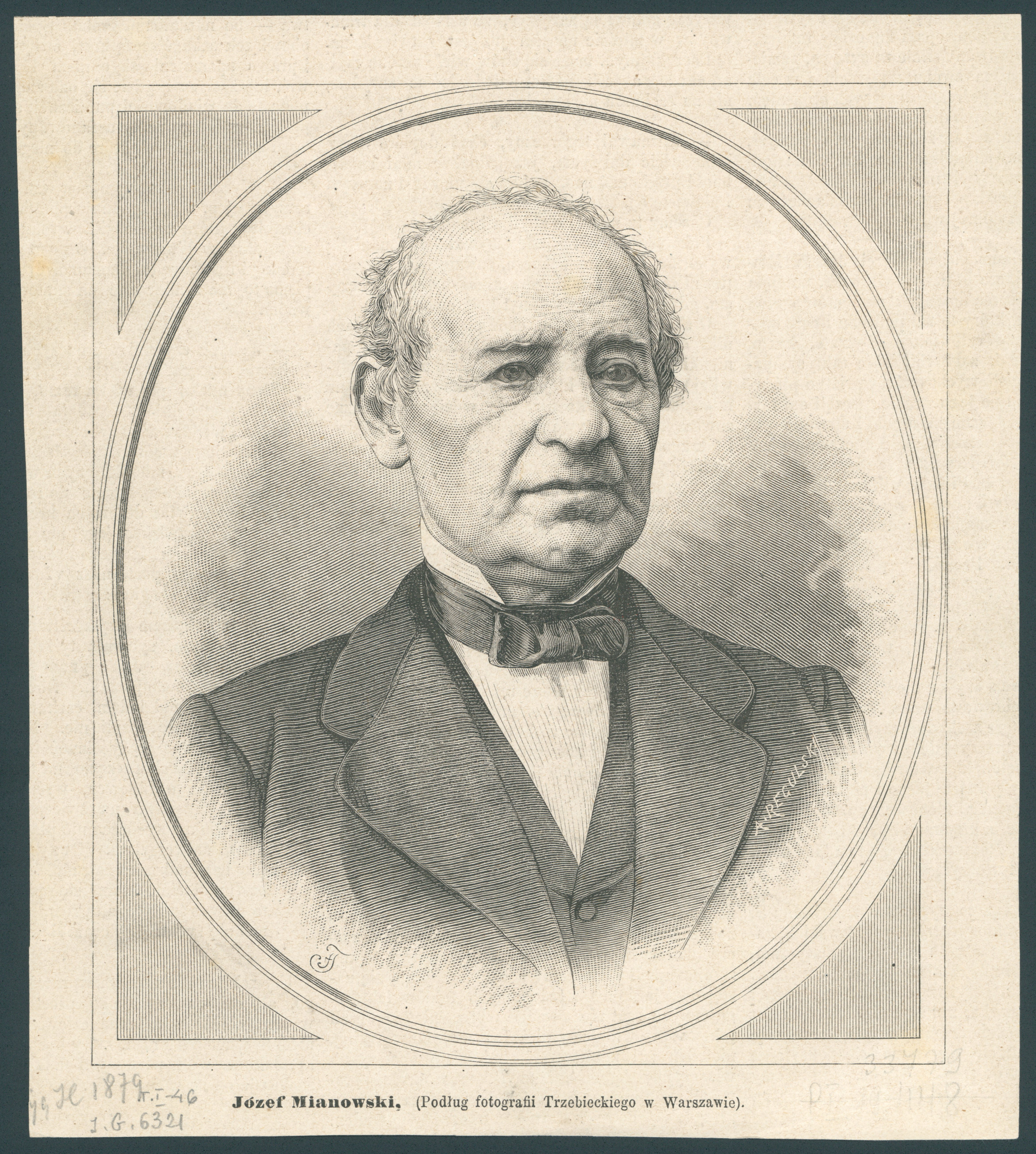 Józef Mianowski, drzzeworyt, 1879 r.